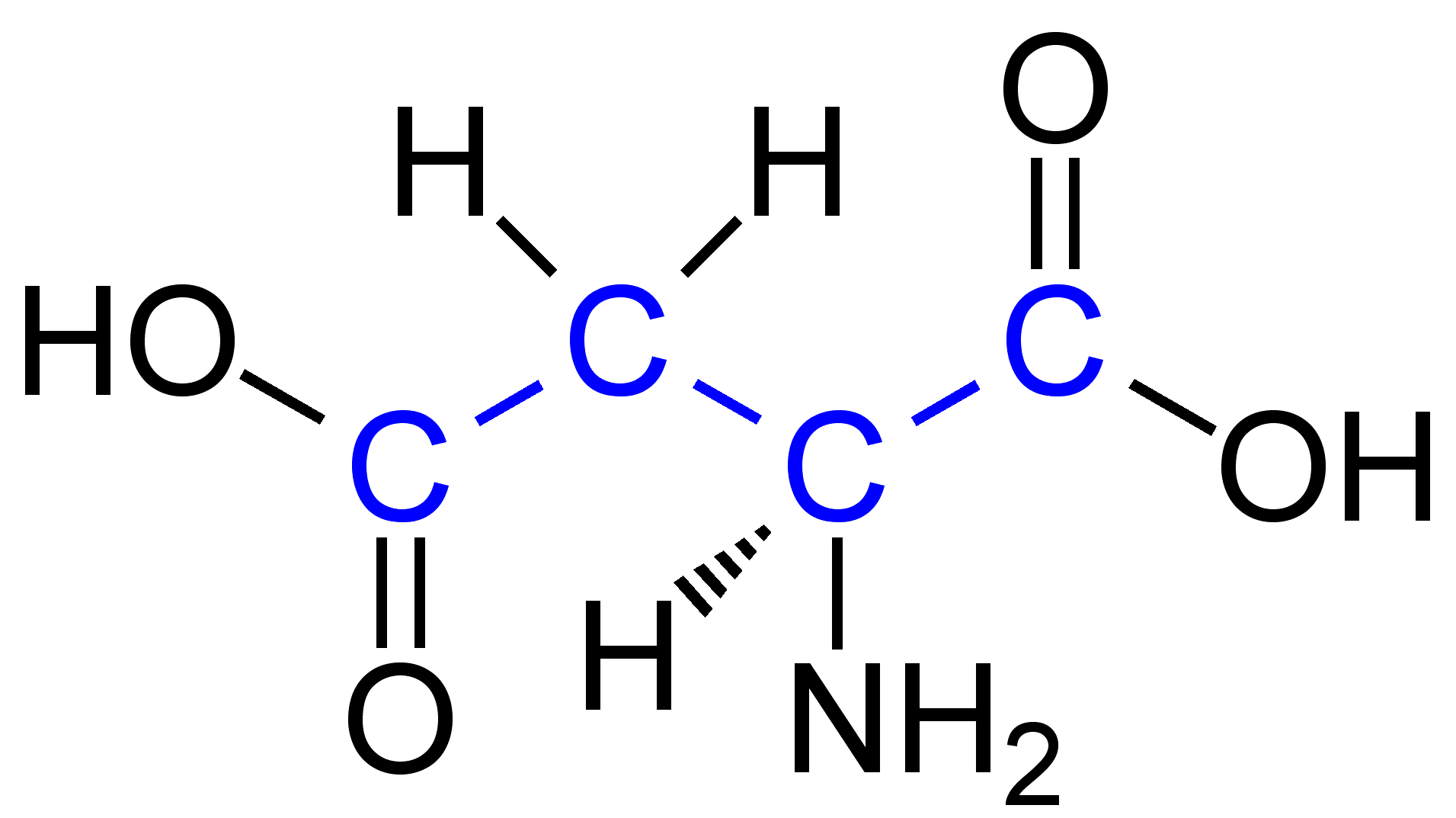 L-Aspartic_Acid_(blue)_Structure